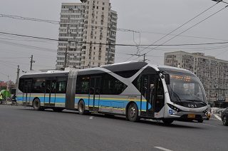 中文（中国大陆）: 青年汽车厂生产的新型无轨电车